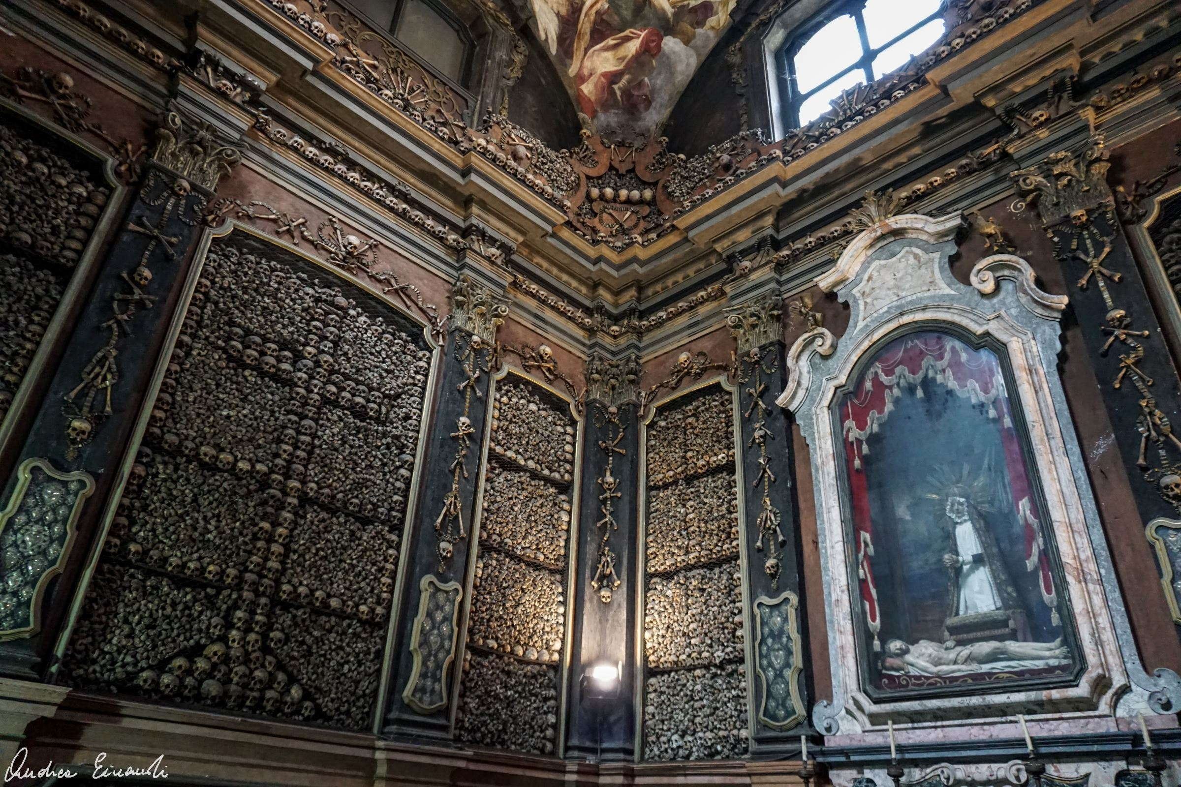 interno dell'ossario